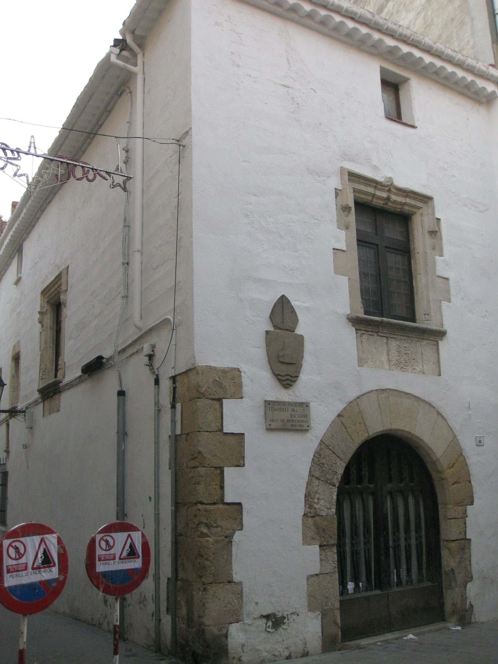 Casa pairal de l'Abat Escarré (l'Arboç)